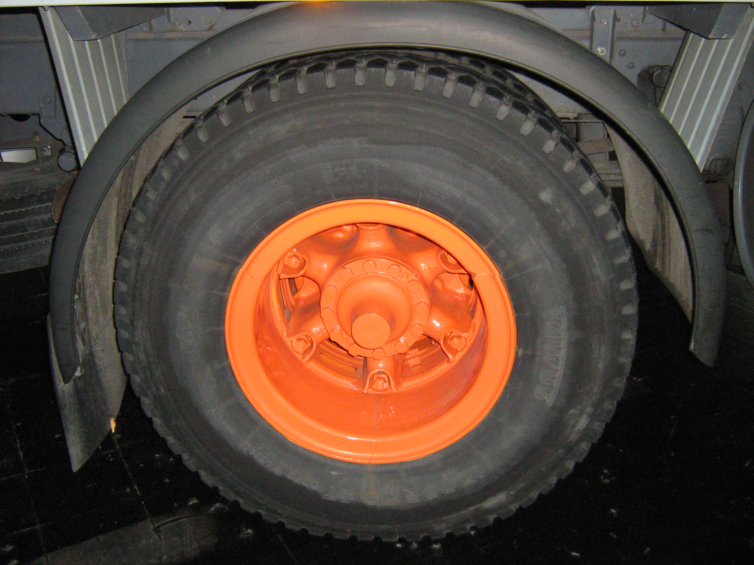 LKW Rad mit einer Trilex-Felge